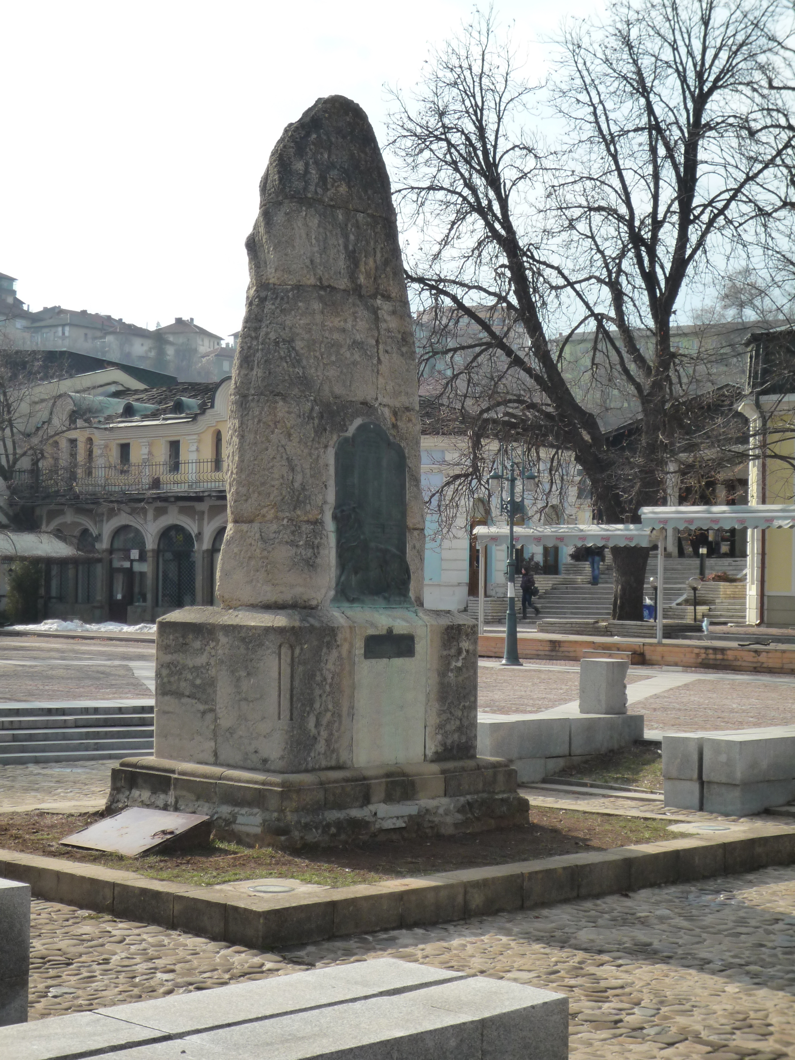 Издигнат в памет на ловчанлията Тодор Кирков - националреволюционер, участник в Априлското въстание (1876)